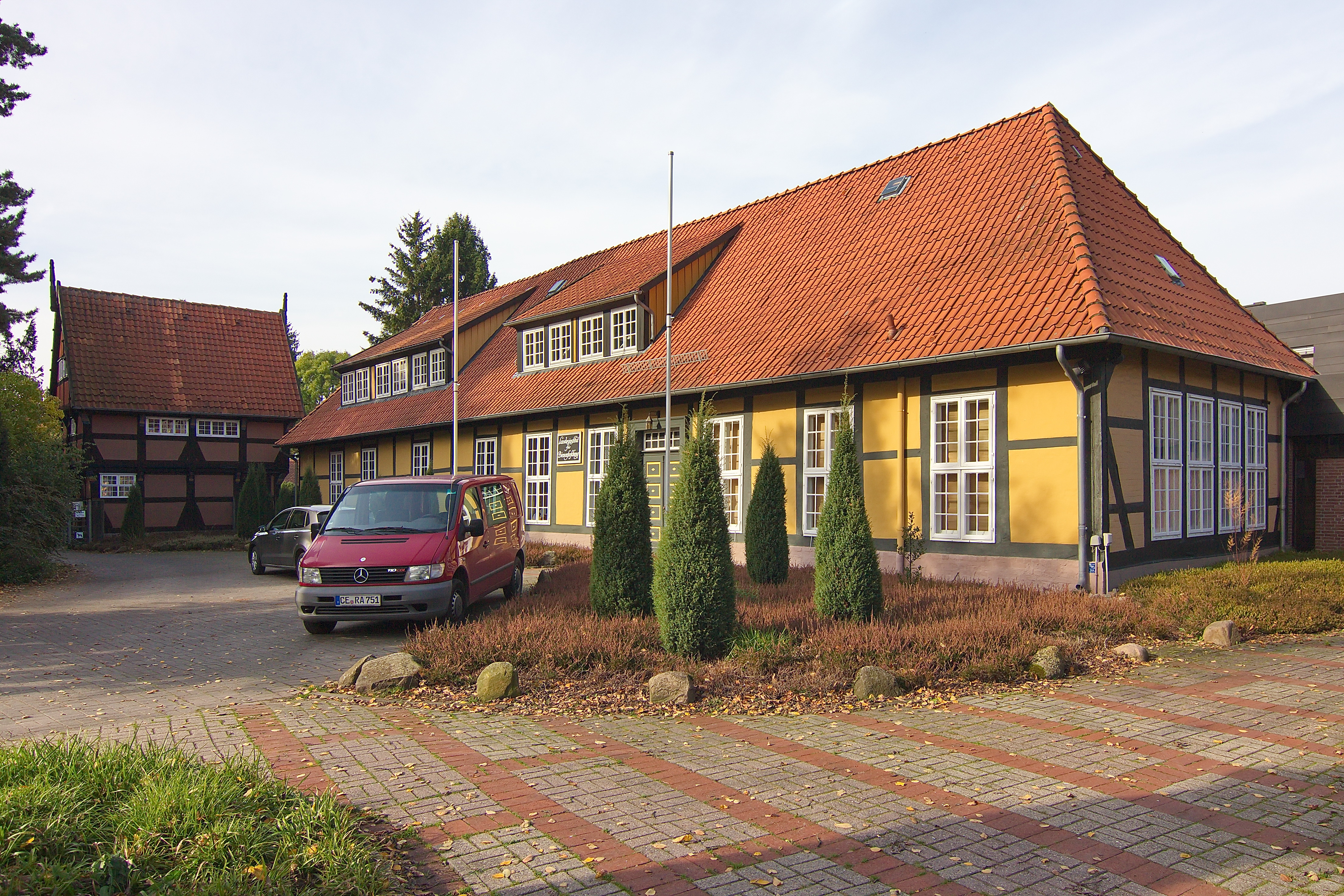 Institut für Bienenkunde am Französischen Garten in Celle, Niedersachsen, Deutschland